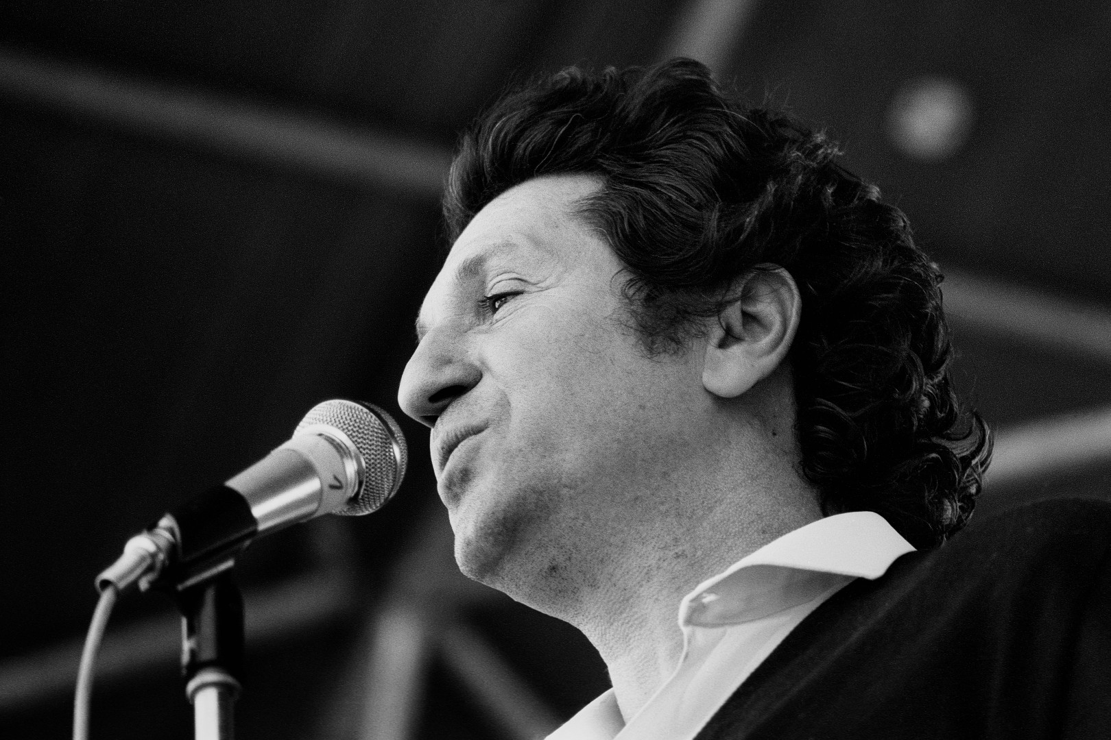 Mouloudji, Fête du PSU, Colombes, 1973